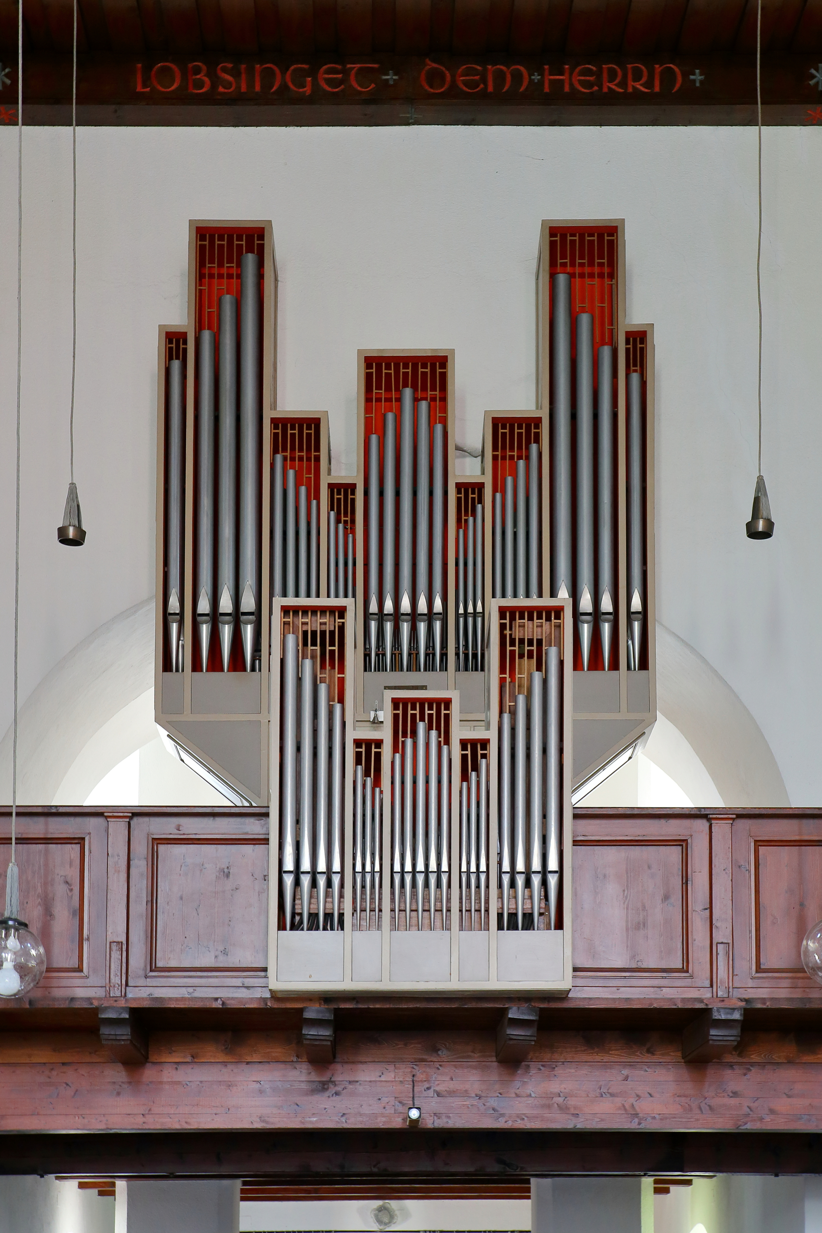 Orgel der röm.-kath. Pfarrkirche hll. Georg und Margarethe in der niederösterreichischen Gemeinde Alland. Die Orgel mit 16 Register und zwei Manuale wurde 1966 von dem Orgelbauer Gregor Hradetzky gebaut.